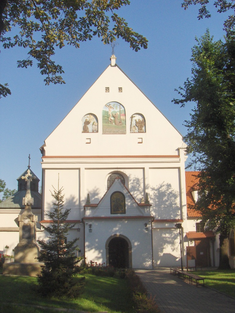 Dziedziniec klasztorny